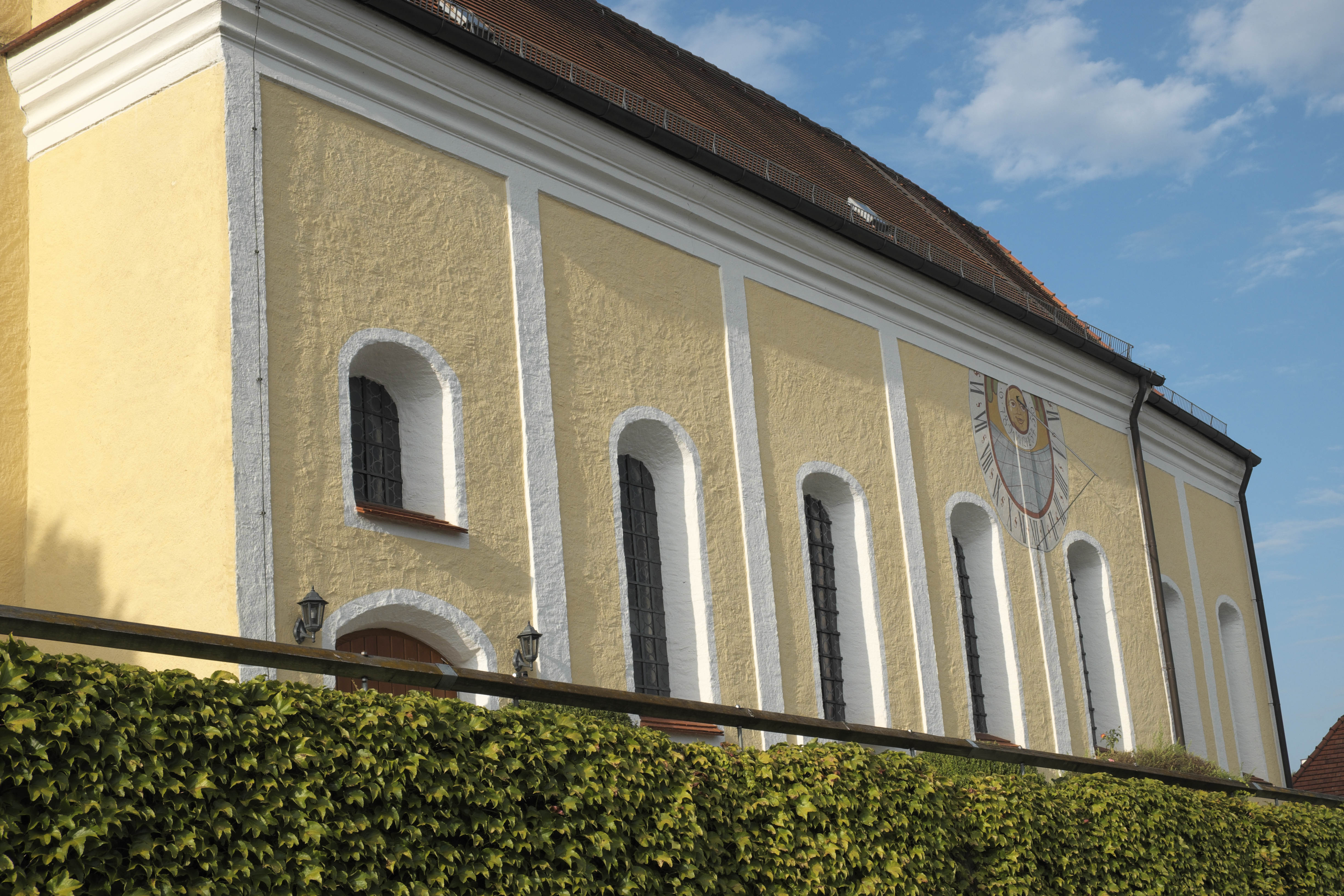 Katholische Pfarrkirche St. Laurentius in Haag an der Amper im Landkreis Freising (Bayern/Deutschland), Südseite